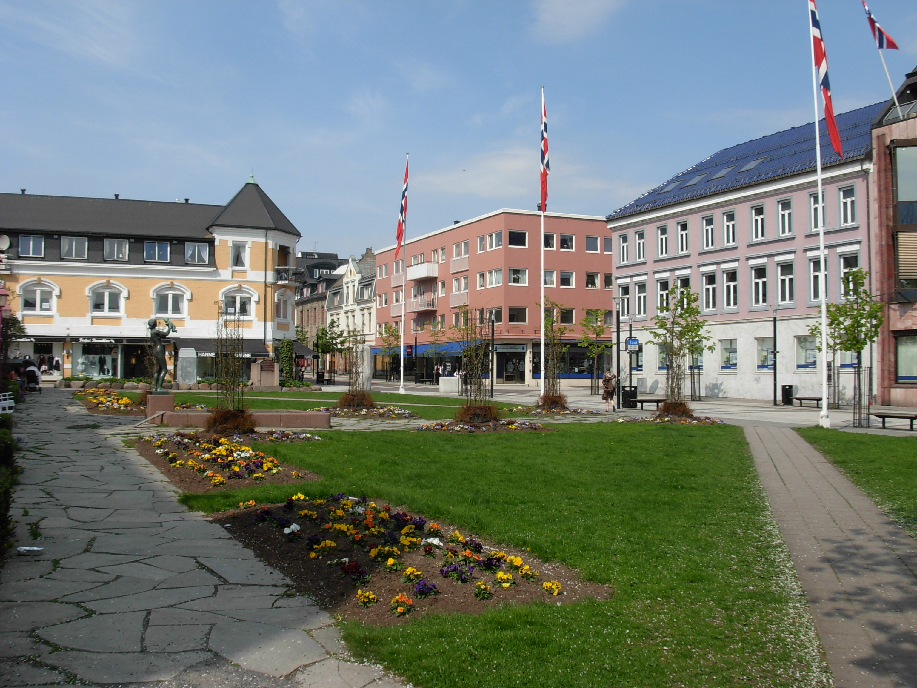 Bytunet, Sandefjord, Norway